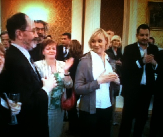 Sonia Bohosiewicz na 4. Nowojorskim Festiwalu Filmów Polskich (2008 r.)